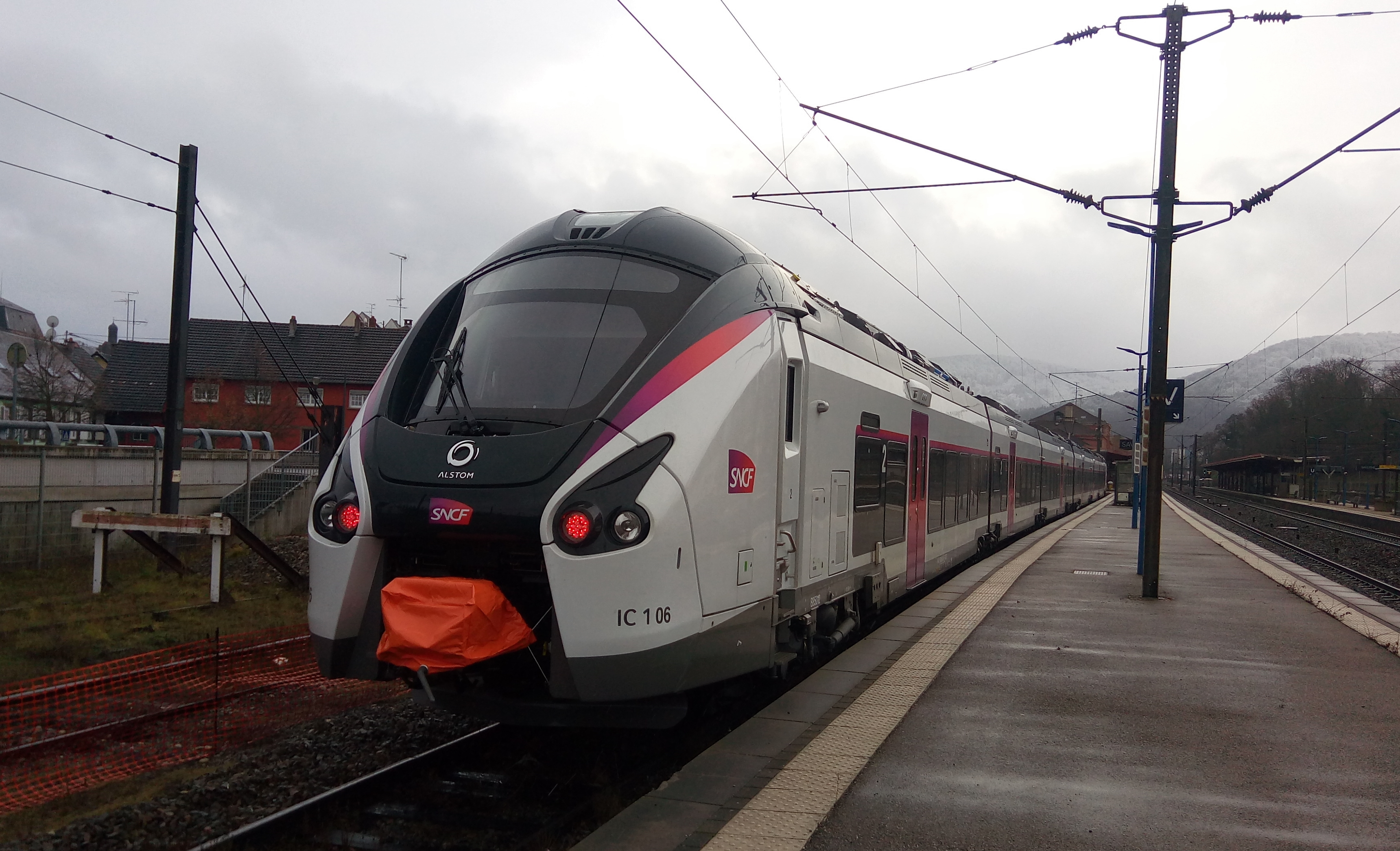 Coradia Liner IC n°106 - ou SNCF Class B 85000, en gare de Saverne en 2017